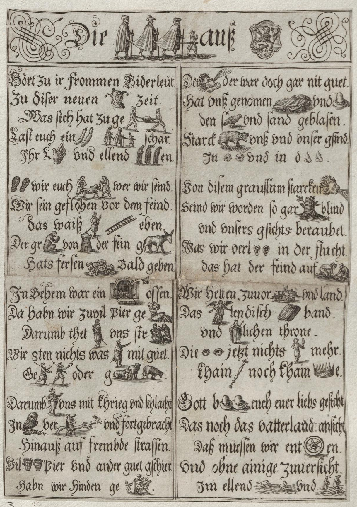 Grafik aus dem Klebeband Nr. 18 der Fürstlich Waldeckschen Hofbibliothek Arolsen. Solution based on Die historisch-politischen Volkslieder des dreißigjährigen Krieges … von Franz Wilhelm Freiherrn von Ditfurth, page 312, number 126. Motiv: Rebus-Gedicht Die [Blinden] auß [Böhmen] Lösungsversuch: Hoert zu ir frommen Biderleüt. Zu diser neuen [Narren]zeit. Was sich hat zuge[tragen]. Last euch ein [arme] [Blinden]schar Ihr L[eid] vnd ellend [klag]en [Sohlen/Solln] wir euch [sa(e)gen] wer wir seind, Wir sein geflohen vor dem feind, das waiß [man] [leiter/leider] eben Der gr[af(fe)] von [Thur(m/n)] der fein g[esel] Hats fersen[geld] Bald geben. In Behem war ein [Keller] offen Da habn wir zuvil Pier ge[soffen] Darumb thet [man] vns str[af(f)en] Wir [acht]en nichts was [man] mit güet Ge[boten] oder g[schaf(e/fen)] Darumb [man] vns mit khrieg vnd schlacht In [Eule/Eil] ver[jag(d/t)] vnd fortgebracht Hinauß auf frembde strassen. Vil [Eimer] Pier vnd ander guet gschier. Habn wir Hinden ge[lassen] Der [Wind] der war doch gar nit guet. Hat vnß genomen [Mantel] vnd [Hut] den s[taub(e)] vnd sand geblasen Starck [wid(d)er] vnß vnd vnser gsind. In [Augen] vnd in d [Nasen]. Von disem graussam starcken [Wind] Seind wir worden so gar [stock]blind. vnd vnsers gsichts beraubet. Was wir verl[o(h)ren] in der flucht das hat der feind auf[klaubet] Wir hetten zuuor [stätt] vnd land Das [engel]lendisch [Hosen]band vnd [könig]lichen throne Die [Augen] jetzt nichts [sehen] mehr Khain [Zepter] noch khain [Kron]e Gott b[huet(e)] euch euer liebs gesicht Das noch das vatterland ansicht Daß müessen wir ent[ra(d/th)]en. Vnd ohne ainige Zuuersicht Im ellend [schwimmen] vnd [waten].